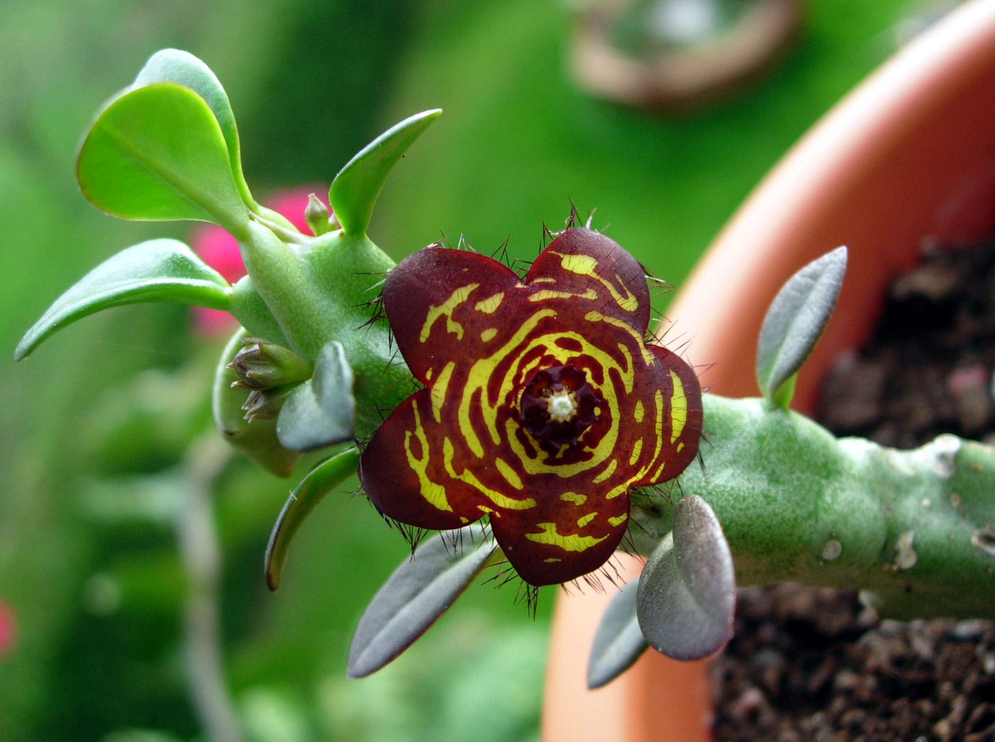 Frerea indica = Caralluma frerei